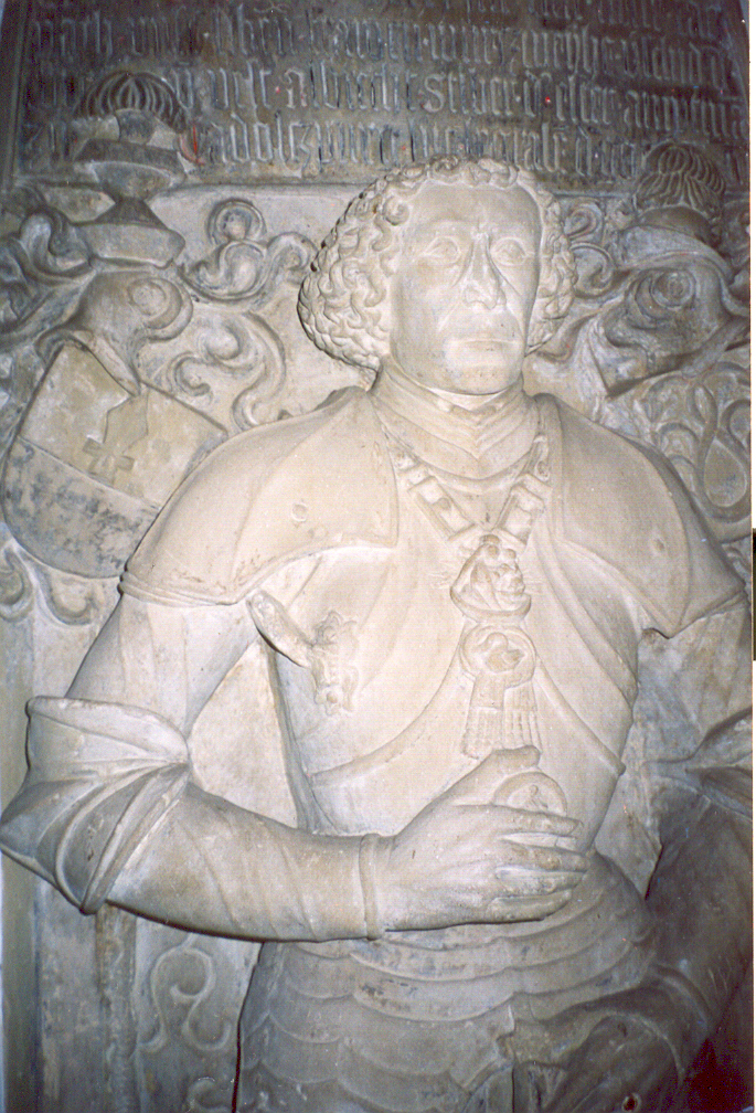 Grabdenkmal Albrecht Stiebars der Ältere (†1491) in der Pfarrkirche Buttenheim (Detail).